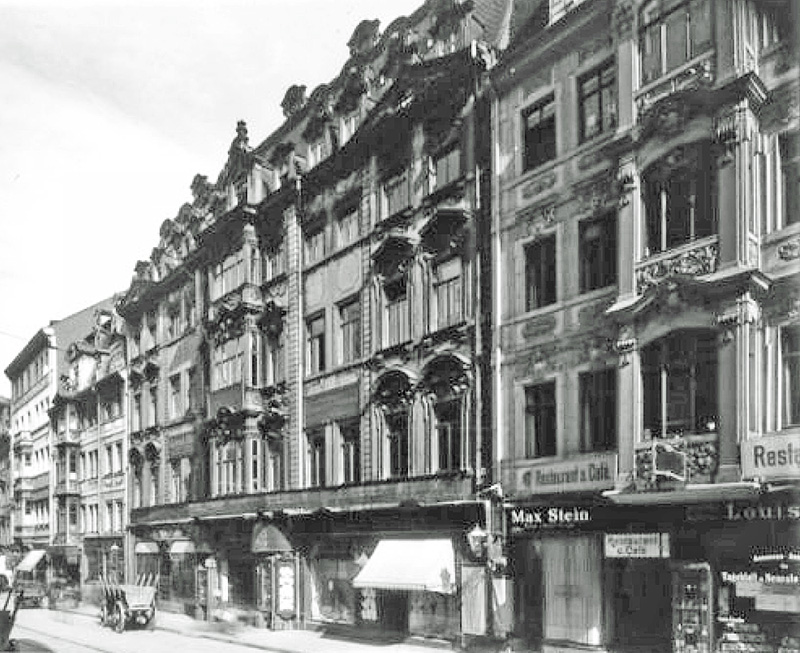 Katharinenstraße 14-20 in Leipzig um 1905. Mitte das Hohmannsche Haus, rechts das Schellhafersche bzw. Oertelsche Haus, ehemals mit dem Zimmermannschen Kaffeehaus